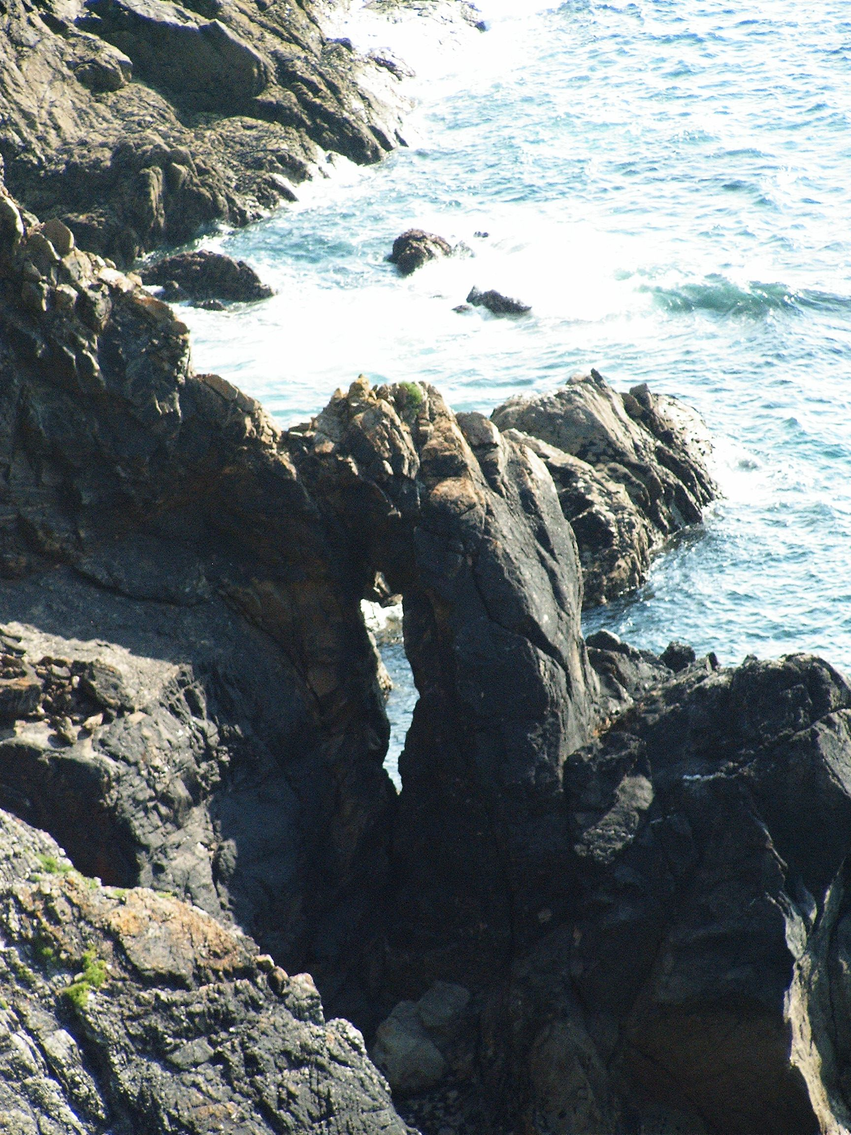 Felsformationen (Felsentor) am Pointe du Van in der Bretagne